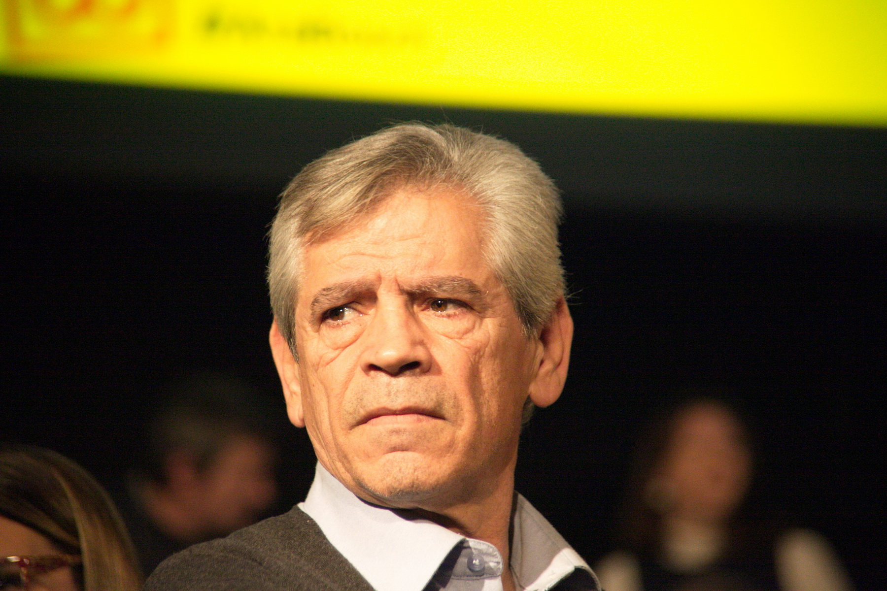 Eduardo Reyes, durant l'acte de presentació de la candidatura d'Alfred Bosch a l'Alcaldia de Barcelona. Cotxeres de Sants, 11-12-2014